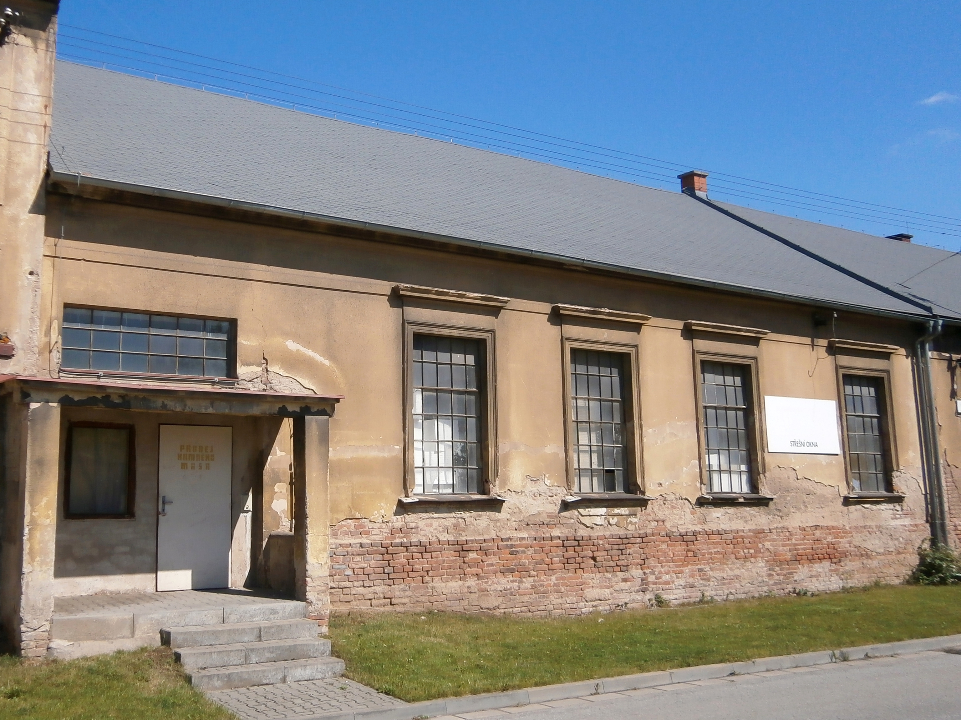 Budovy areálu bývalých ústředních jatek v Hradci Králové